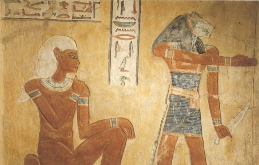 Zwei Dämonen im Grab von Chaemwaset